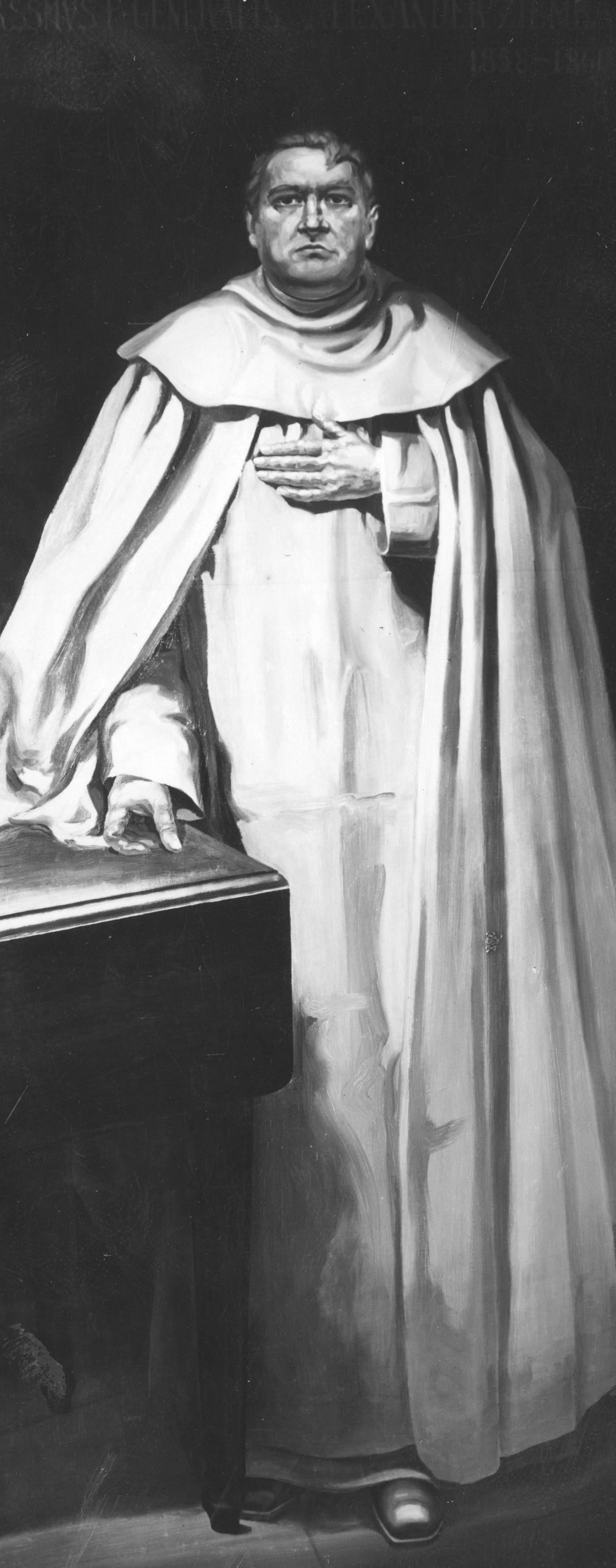 Portret generała zakonu paulinów na Jasnej Górze o. Aleksandra Ziemby. Sygnatura: 1-K-2274